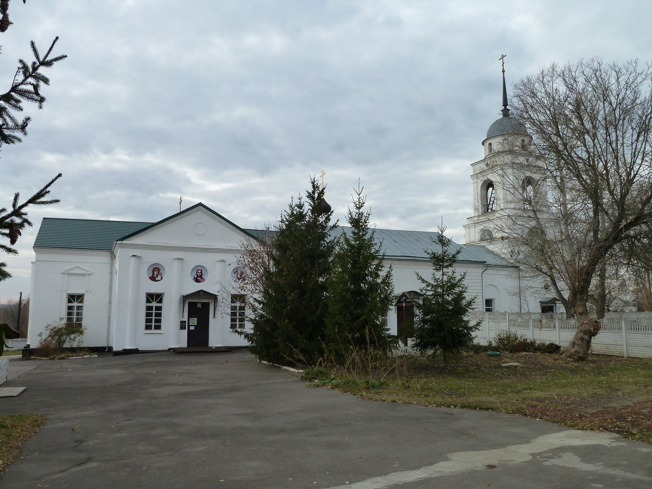 Церковь во имя Николая Чудотворца. Середина XIX в. г. Новосиль